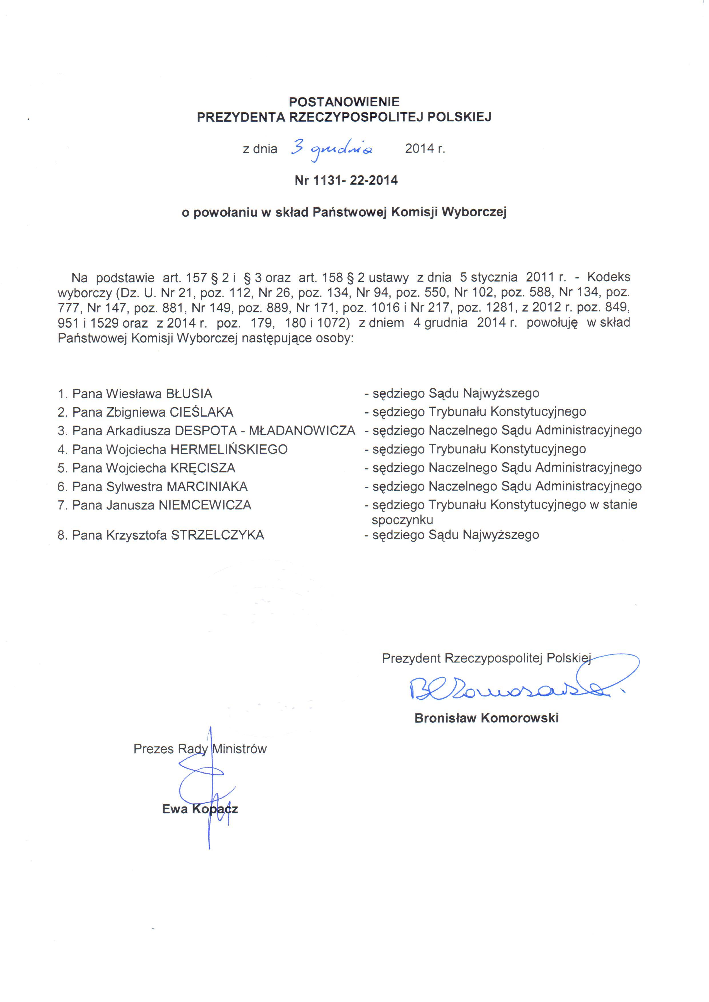 Postanowienie Prezydenta Bronisława Komorowskiego o powołaniu członków Państwowej Komisji Wyborczej